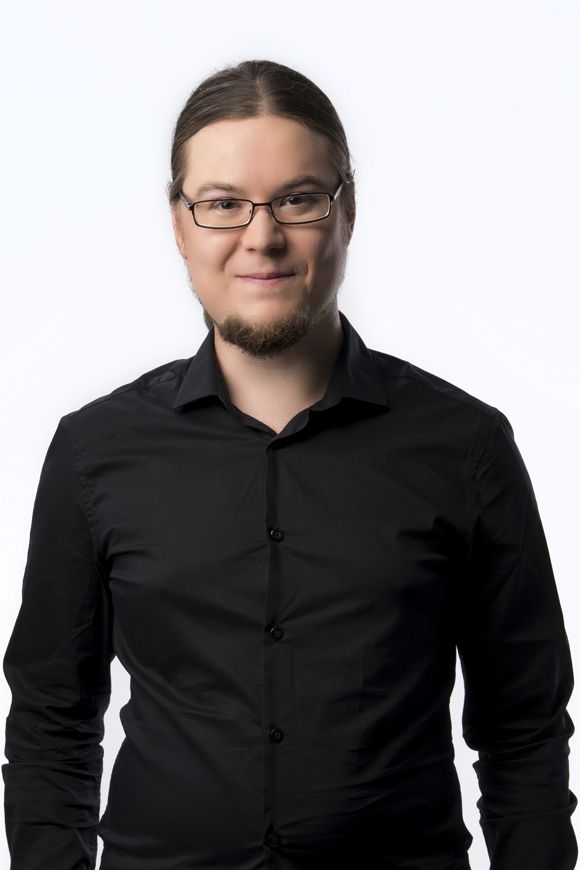 Foto: DIE LINKE. Brandenburg